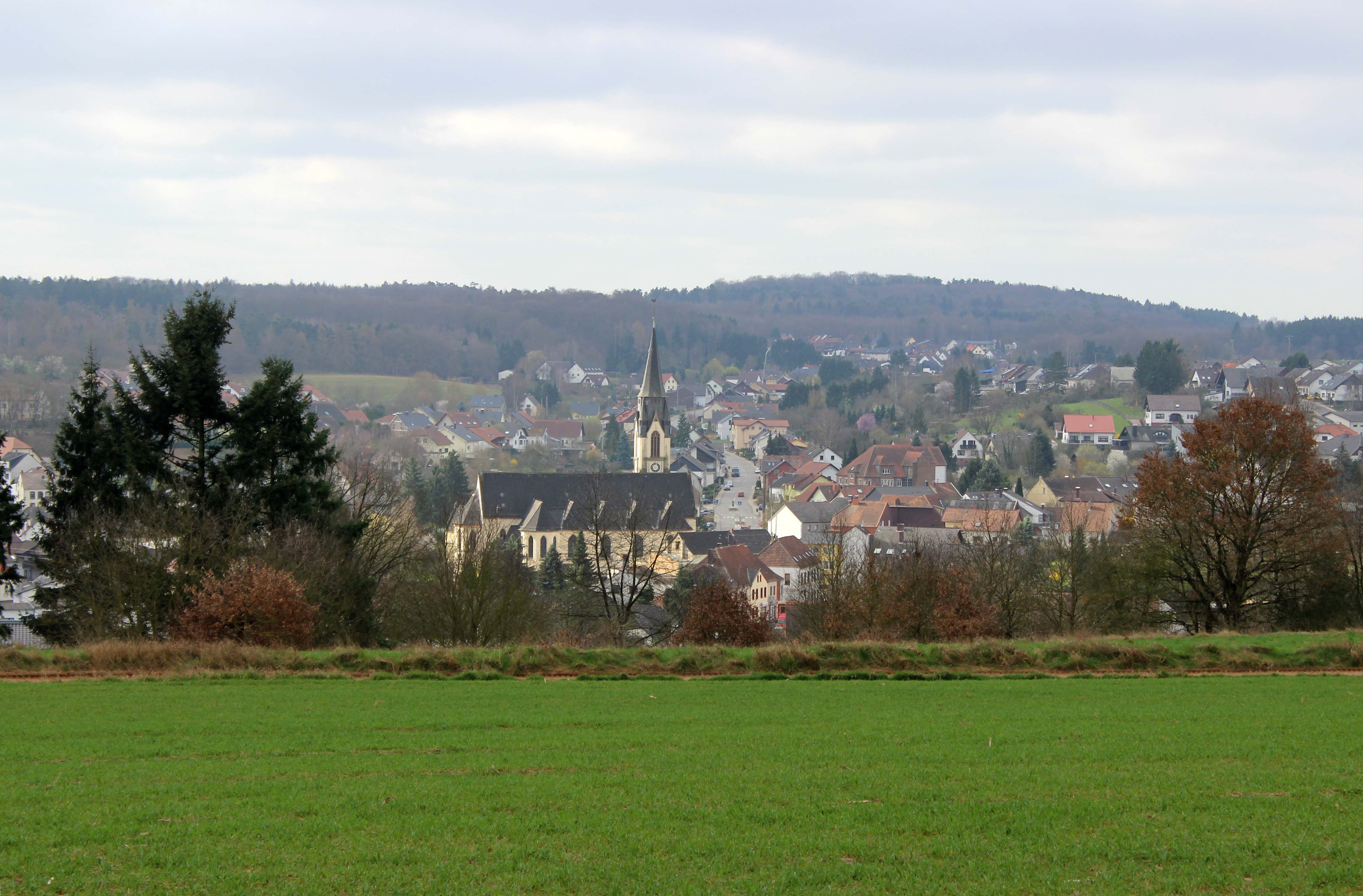 Blick vom Katzenkopf auf Schwarzenholz, einem Ortsteil der Gemeinde Saarwellingen, Landkreis Saarlouis, Saarland